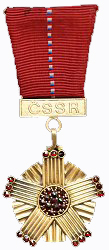 Орден Дружбы (ЧССР)